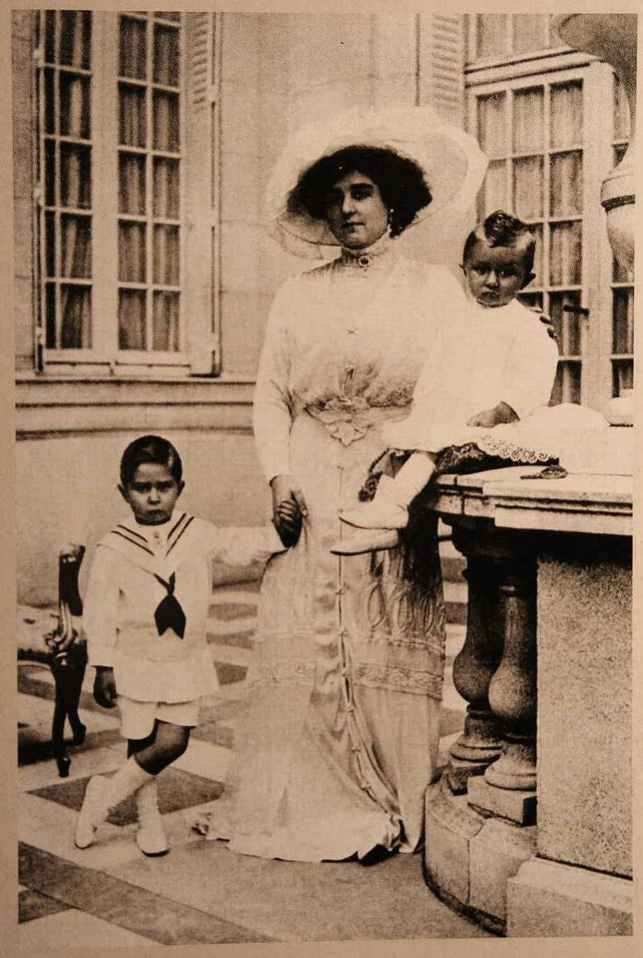 La baronne de Vaughan, maîtresse du roi des Belges Léopold II, avec ses deux enfants